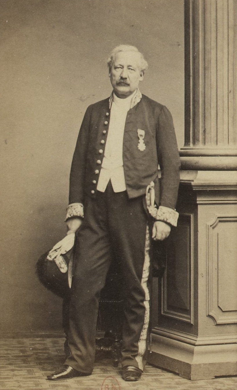 Album des députés au Corps législatif entre 1852-1857.